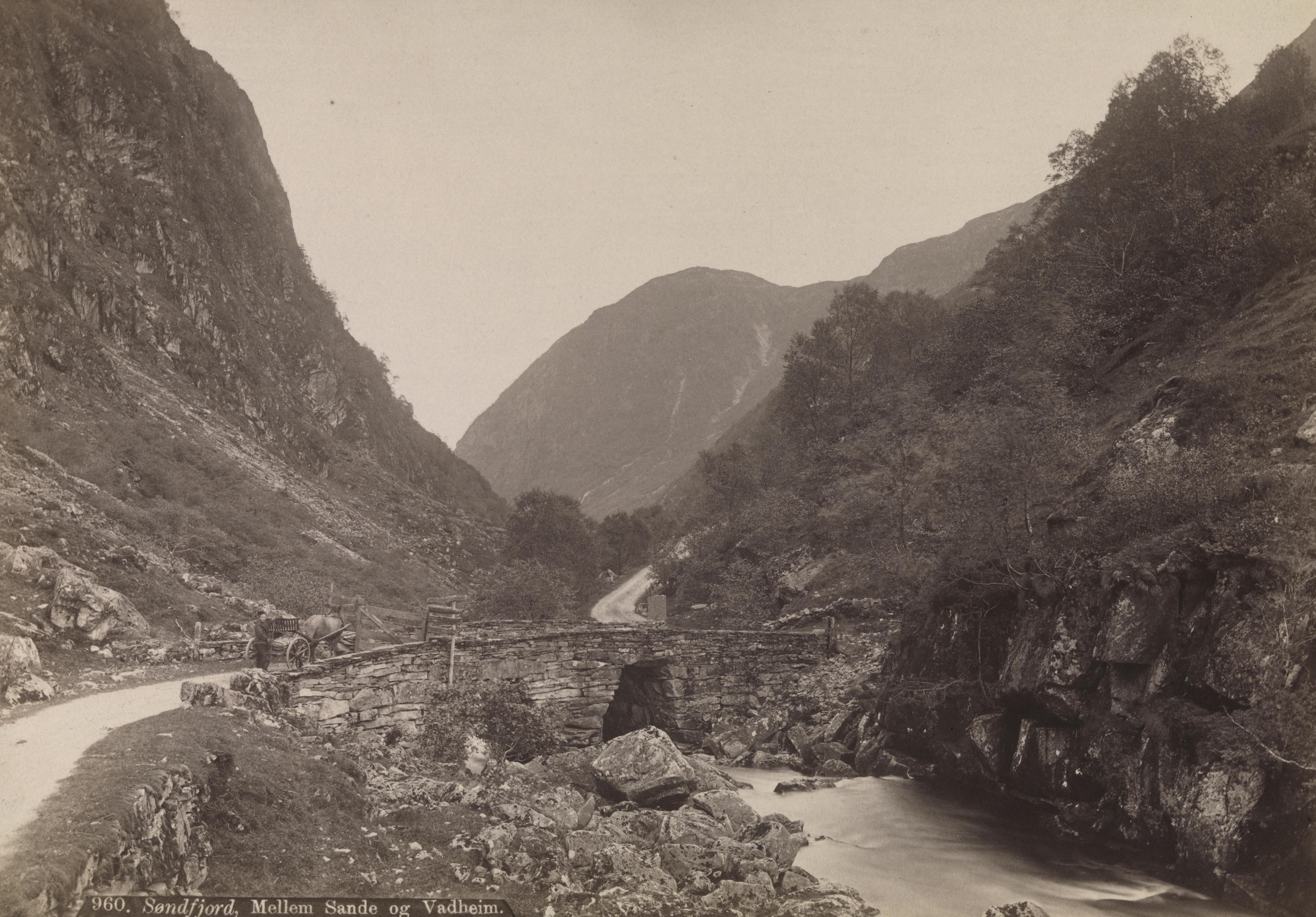 Bildet er hentet fra Nasjonalbibliotekets bildesamling Sunnfjord, Sogn og Fjordane. Kommentar: Bildet viser en gammel utkragingsbro i "Ytredalen", trolig nær utløpet av Dregebøvatnet tett ved dagens E39, i Gaular eller Høyanger kommune.